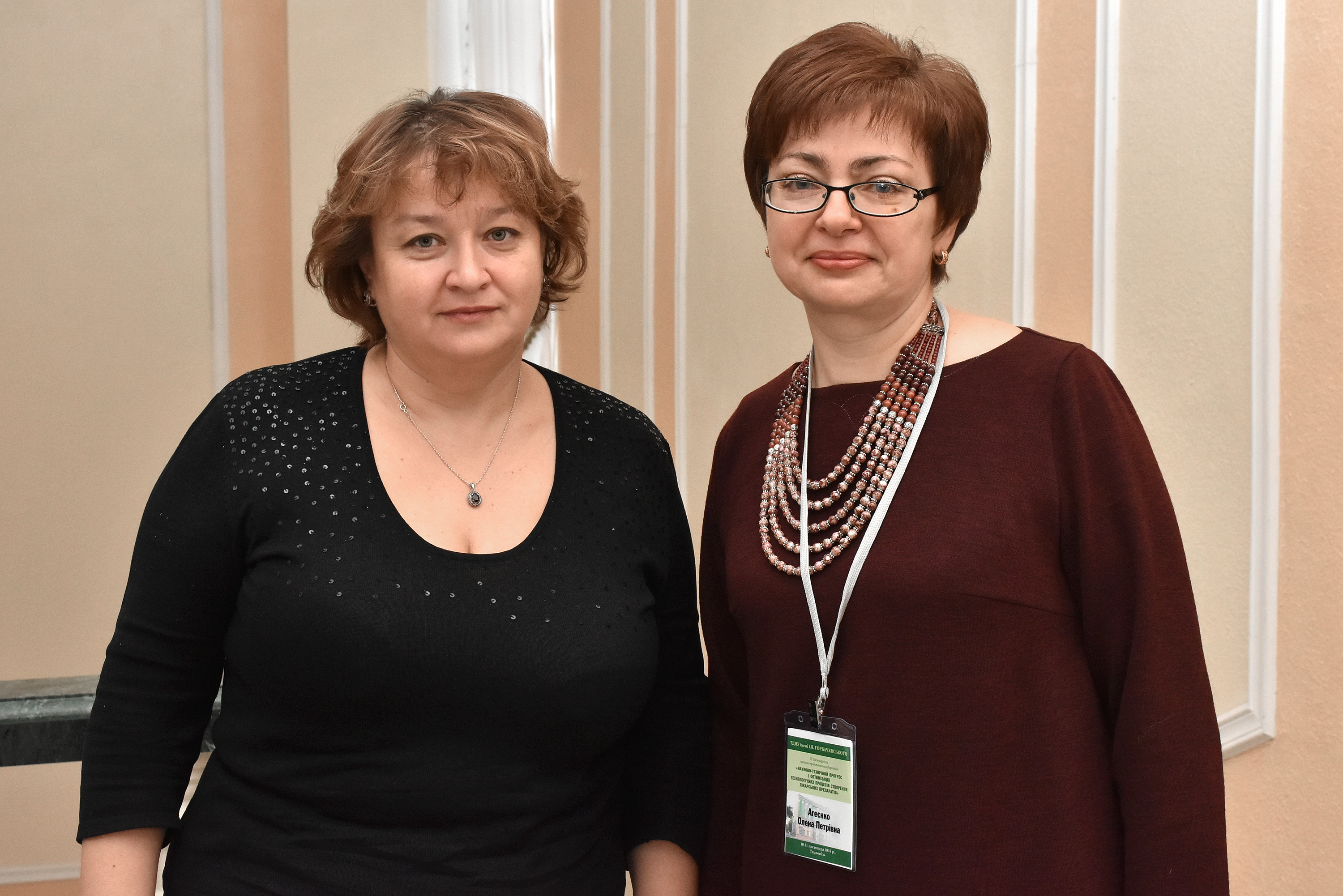 Український вчений у галузі фармакології, доктор медичних наук, професор Олександра Олещук та виконувачка обов'язків начальника Державної служби з лікарських засобів в Тернопільській області Олена Агеєнко на науково-практичній конференції з міжнародною участю «Науково-технічний прогрес і оптимізація технологічних процесів створення лікарський препаратів», яка відбулася 10 листопада 2016 року в Тернопільському державному медичному університеті імені І. Я. Горбачевського.